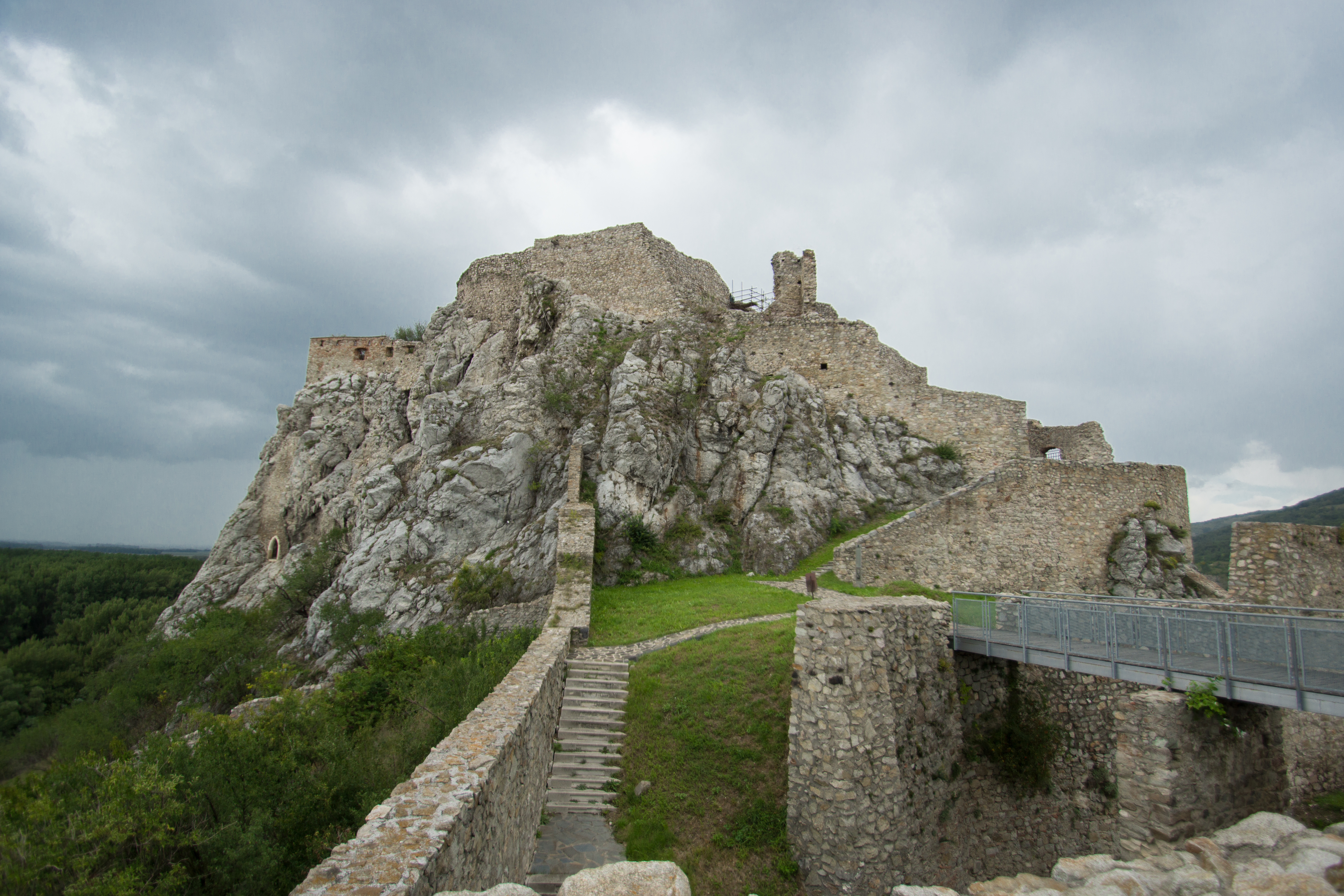 Castillo de Devin